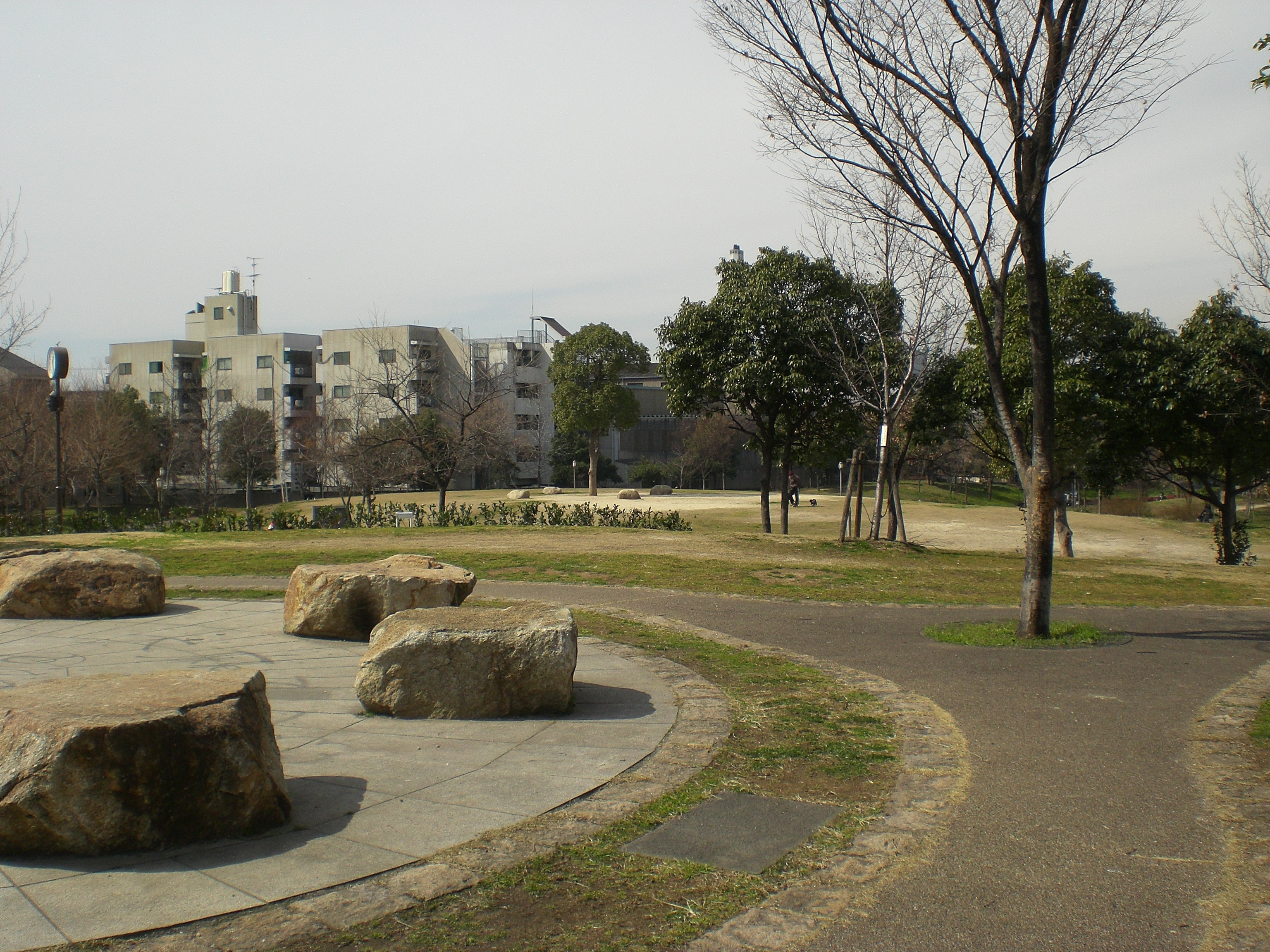 説明=南津守中央公園の築山から撮った写真 出典= 製作日= 作者=ぴこぽこ